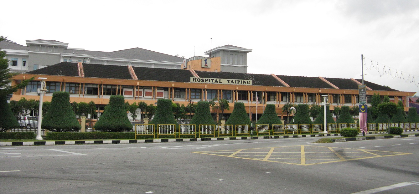 Taiping General Hospital